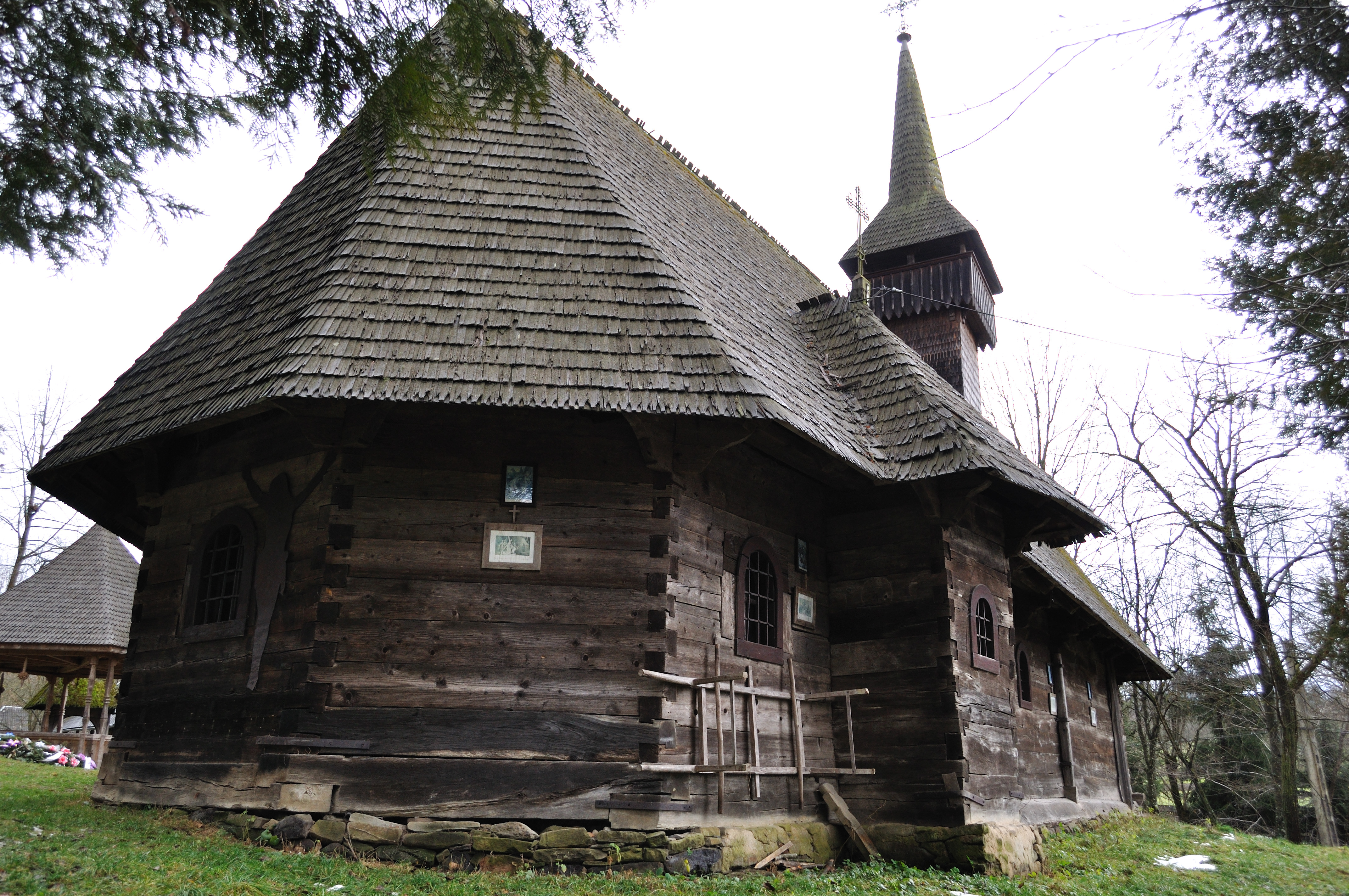 Biserica de lemn din Breb, județul Matramureș 01